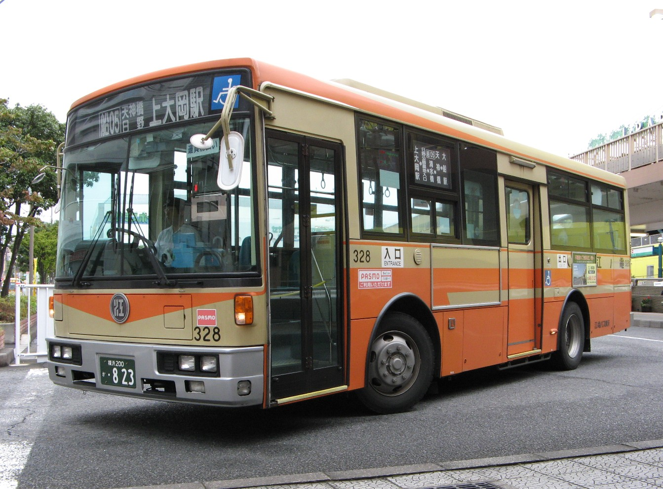 江ノ電バス横浜328号車。大船駅東口バスターミナル歩道上で撮影。